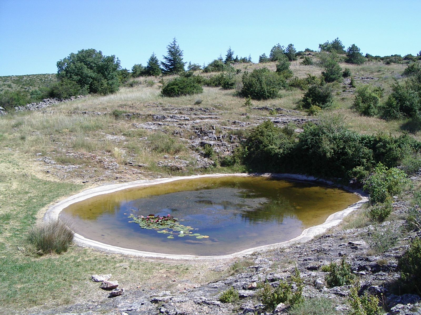 Lavogne, (une dépression, on a aménagé imperméable, p.e. pavé de terra rosa (terre rouge)) sur le Causse de Blandas.